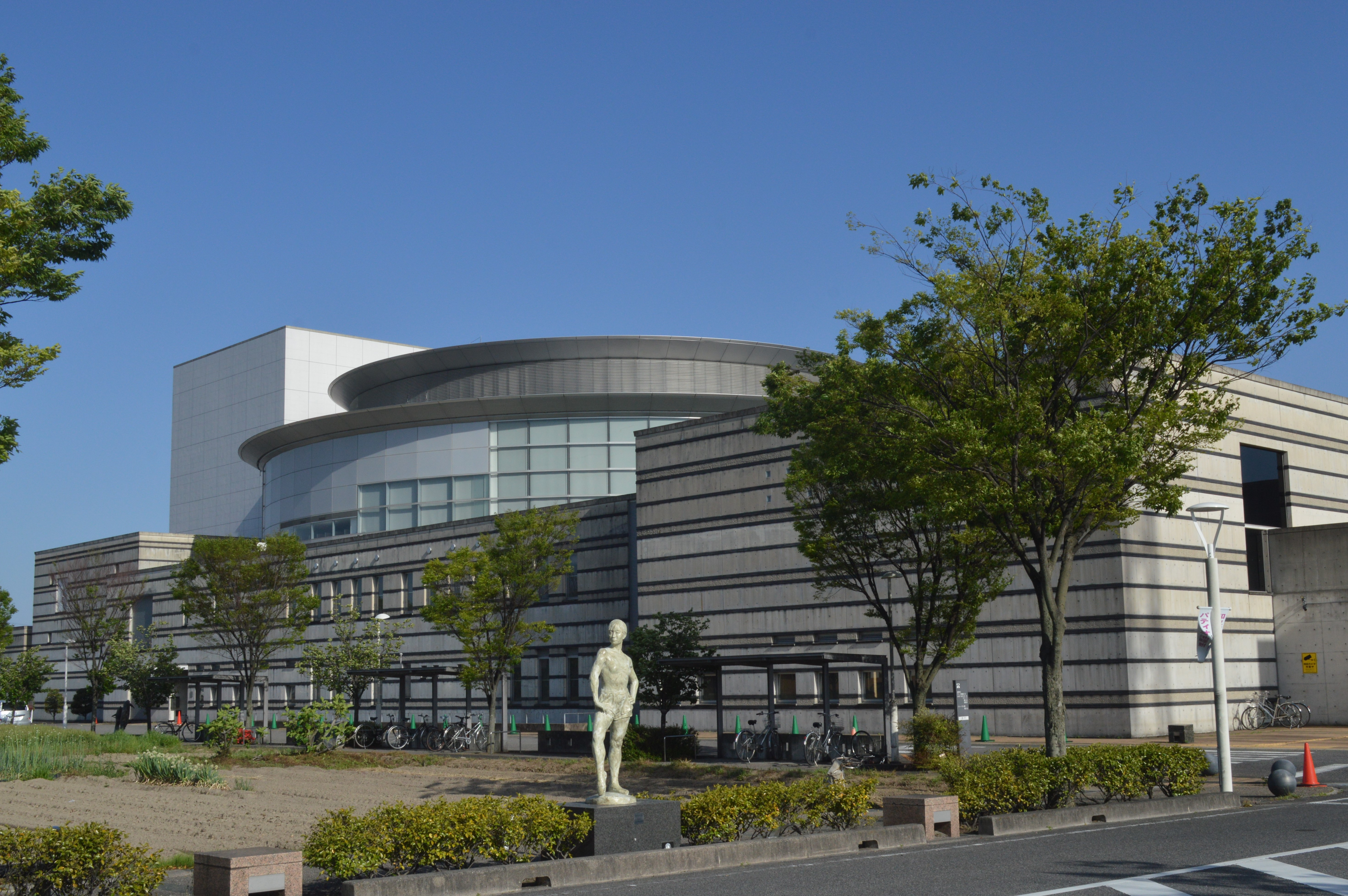 愛知県知立市にある総合文化施設「パティオ池鯉鮒」（知立市文化会館）。